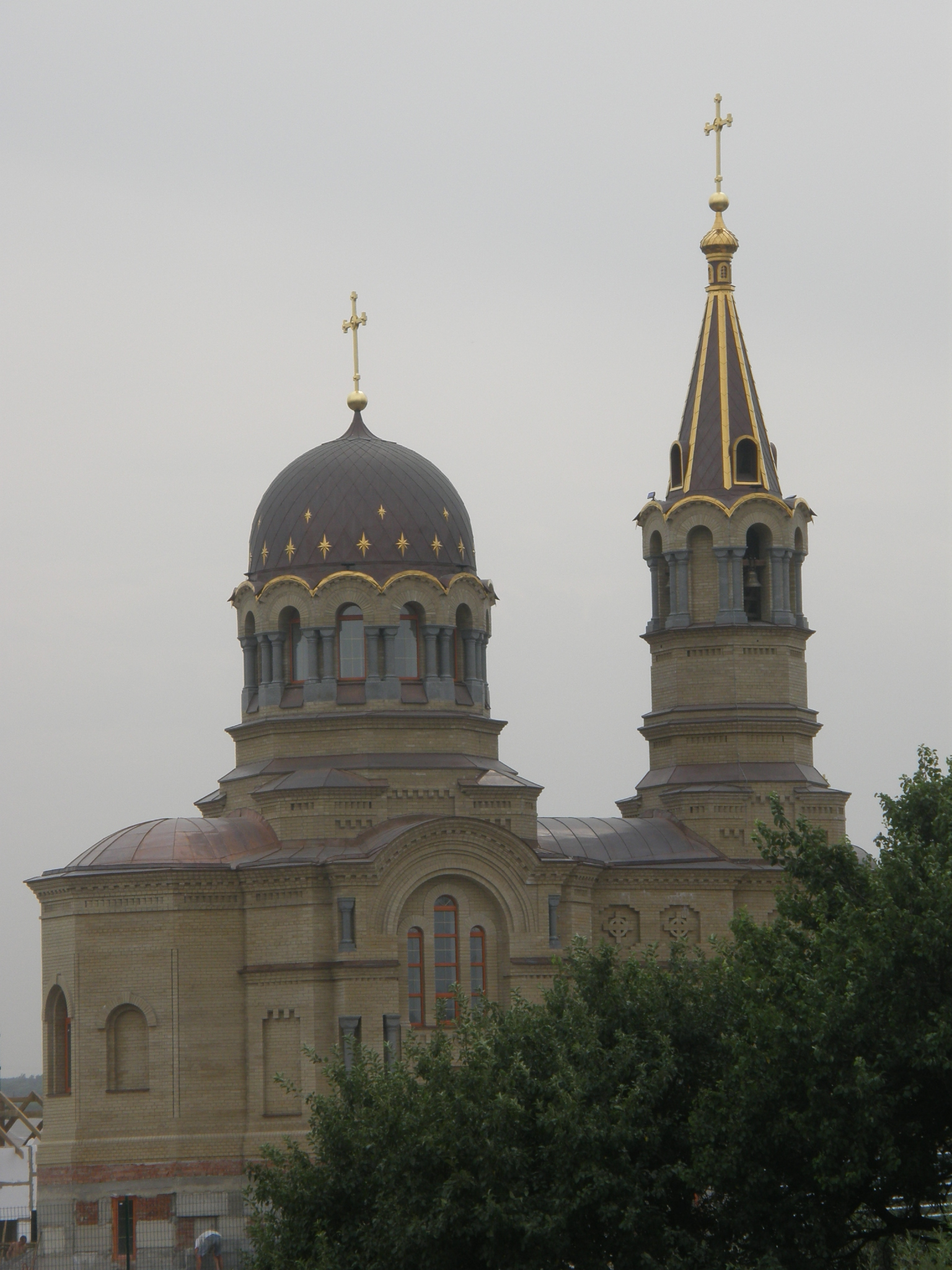 Донецк. Свято-Михайловский храм.